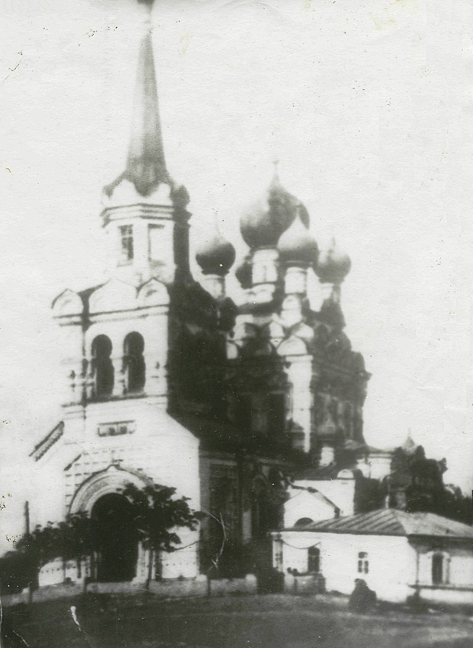 Разрушенная после Революции церковь в селе Фёдоровка Неклиновского района Ростовской области